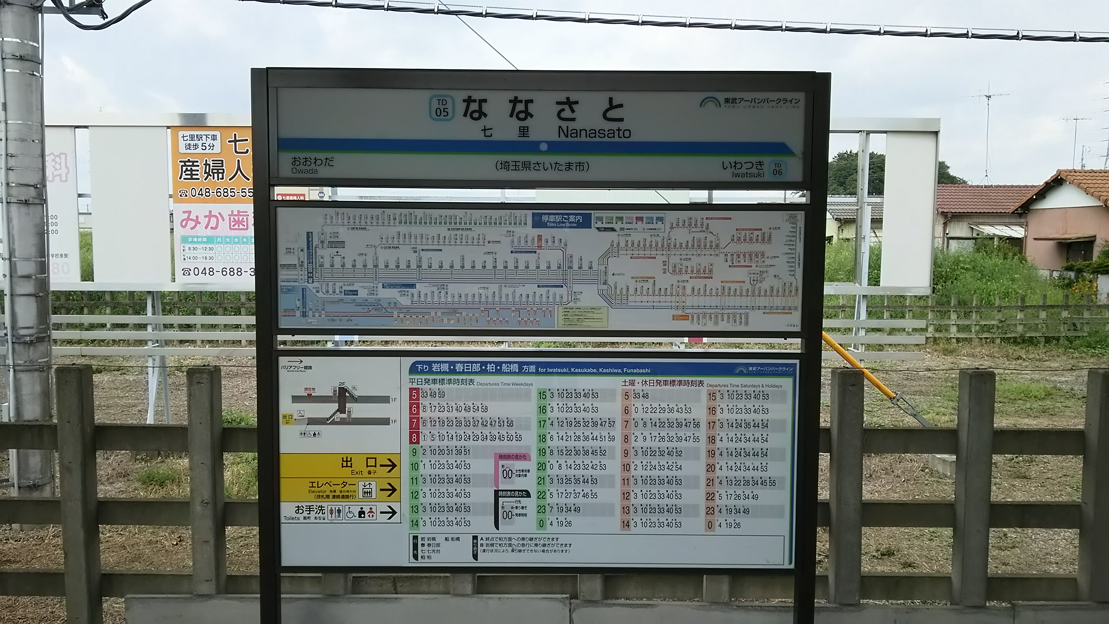 七里駅 駅名標（２番線）